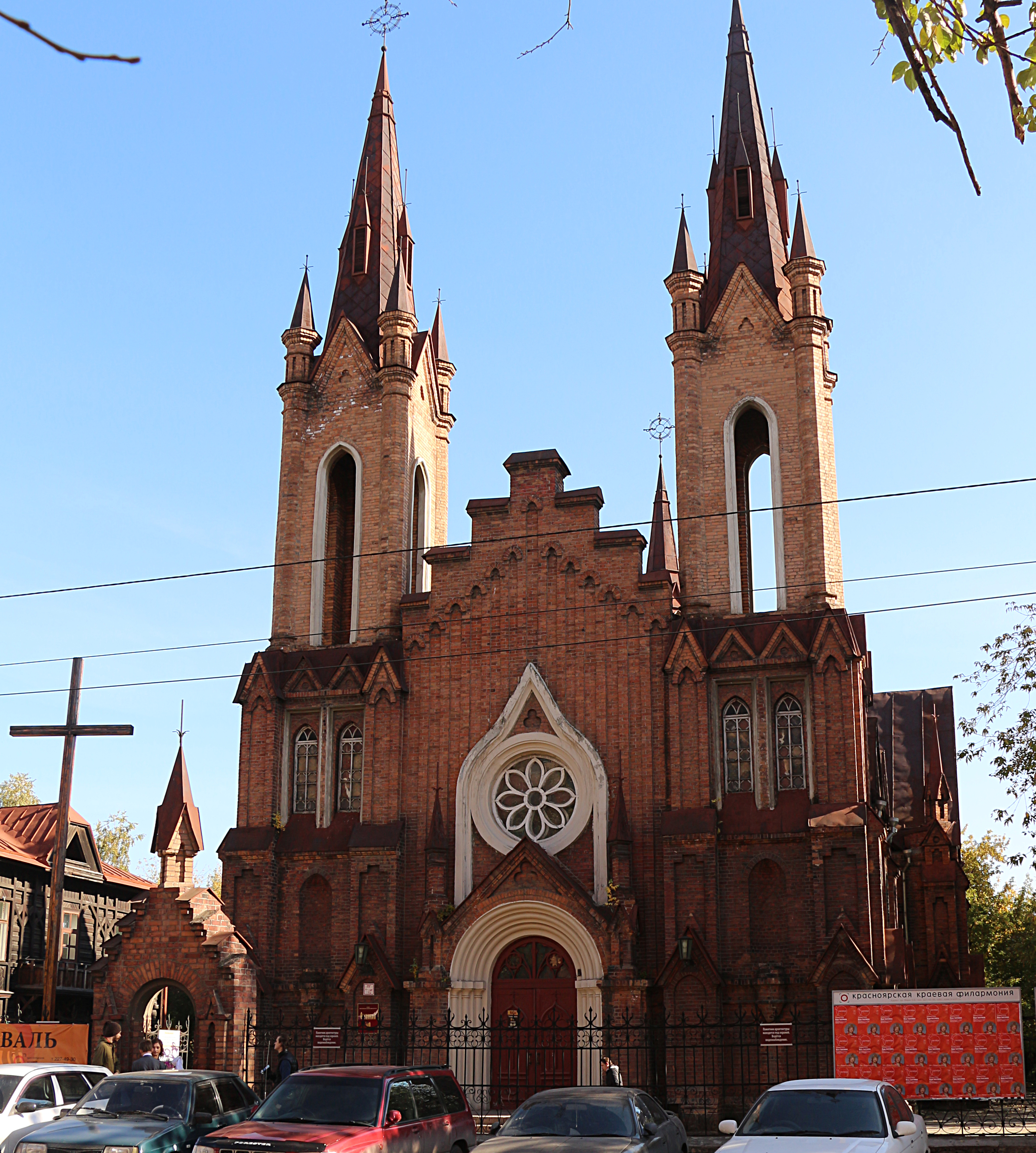 Костел римско-католический (Красноярский край, Красноярск, Декабристов улица, 20, 22)